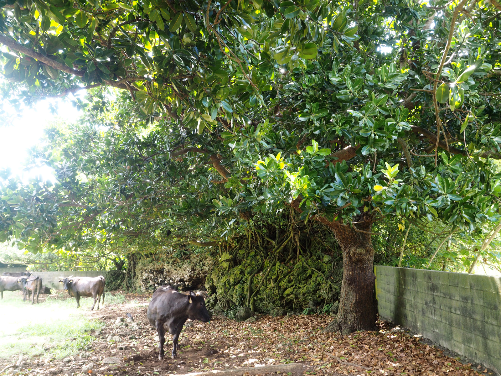 高こるせ石（たかこるせいし） 天然記念物「石垣島東海岸の津波石群」のひとつ（沖縄県石垣市石垣島）